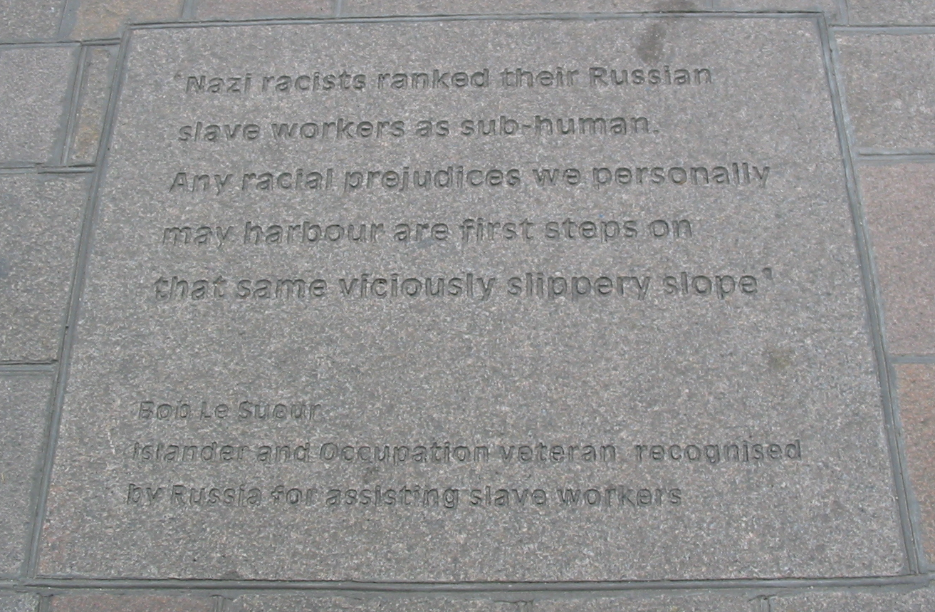 Nrf: Pliaque dans l'pavé à Saint Hélyi, Jèrri, en mémouaithe d'l'Otchupâtion.